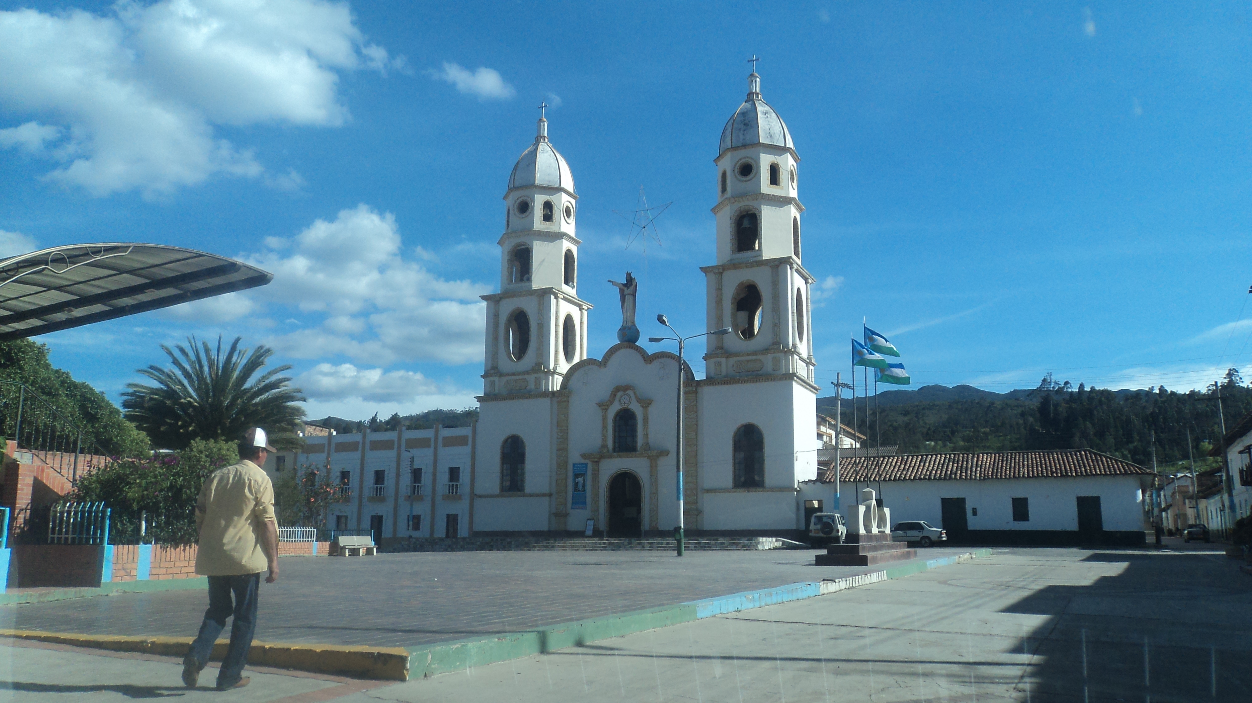 Parque principal Susacon